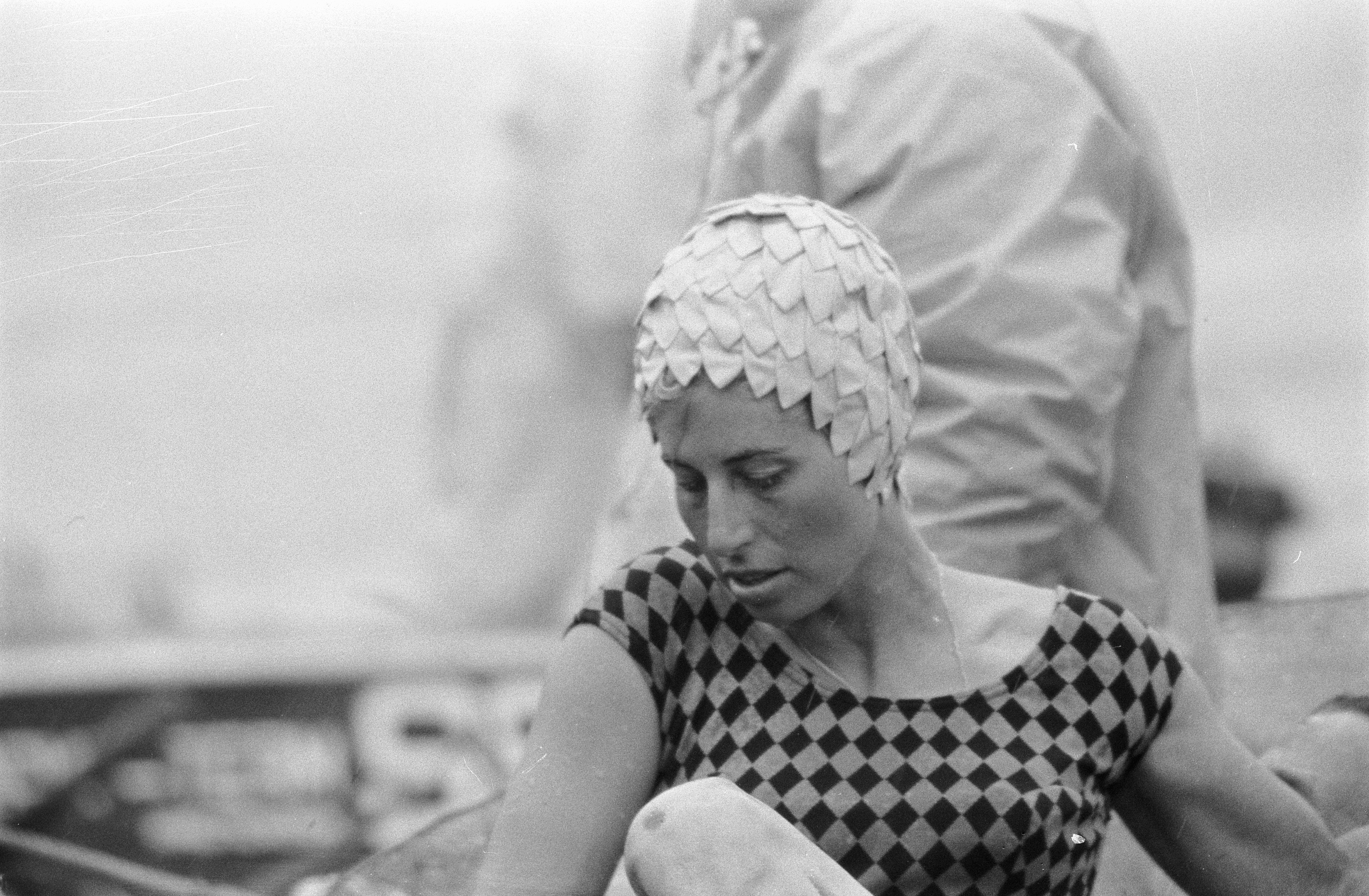 Collectie / Archief : Fotocollectie Anefo Reportage / Serie : [ onbekend ] Beschrijving : Waterskikampioenschap op de Bosbaan te Amsterdam Juliana Drooge werd kampioen bij de dames Datum : 10 juli 1960 Locatie : Amsterdam, Noord-Holland Trefwoorden : Waterskikampioenschappen, kampioen Persoonsnaam : Drooge, Juliana Fotograaf : Bilsen, Joop van / Anefo Auteursrechthebbende : Nationaal Archief Materiaalsoort : Negatief (zwart/wit) Nummer archiefinventaris : bekijk toegang 2.24.01.05 Bestanddeelnummer : 911-4113